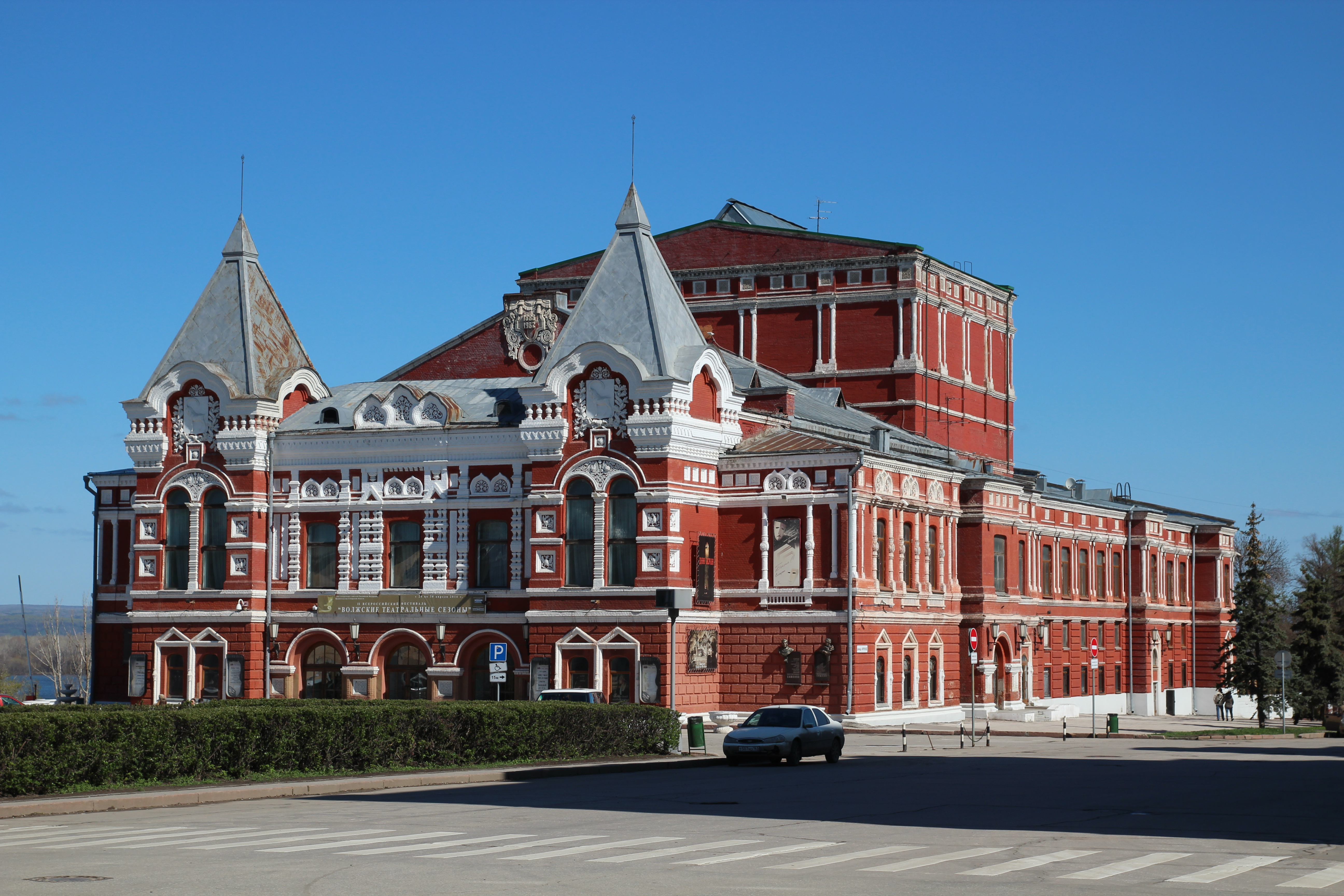 Городской театр: площадь им. Чапаева, Самара, Самарская область